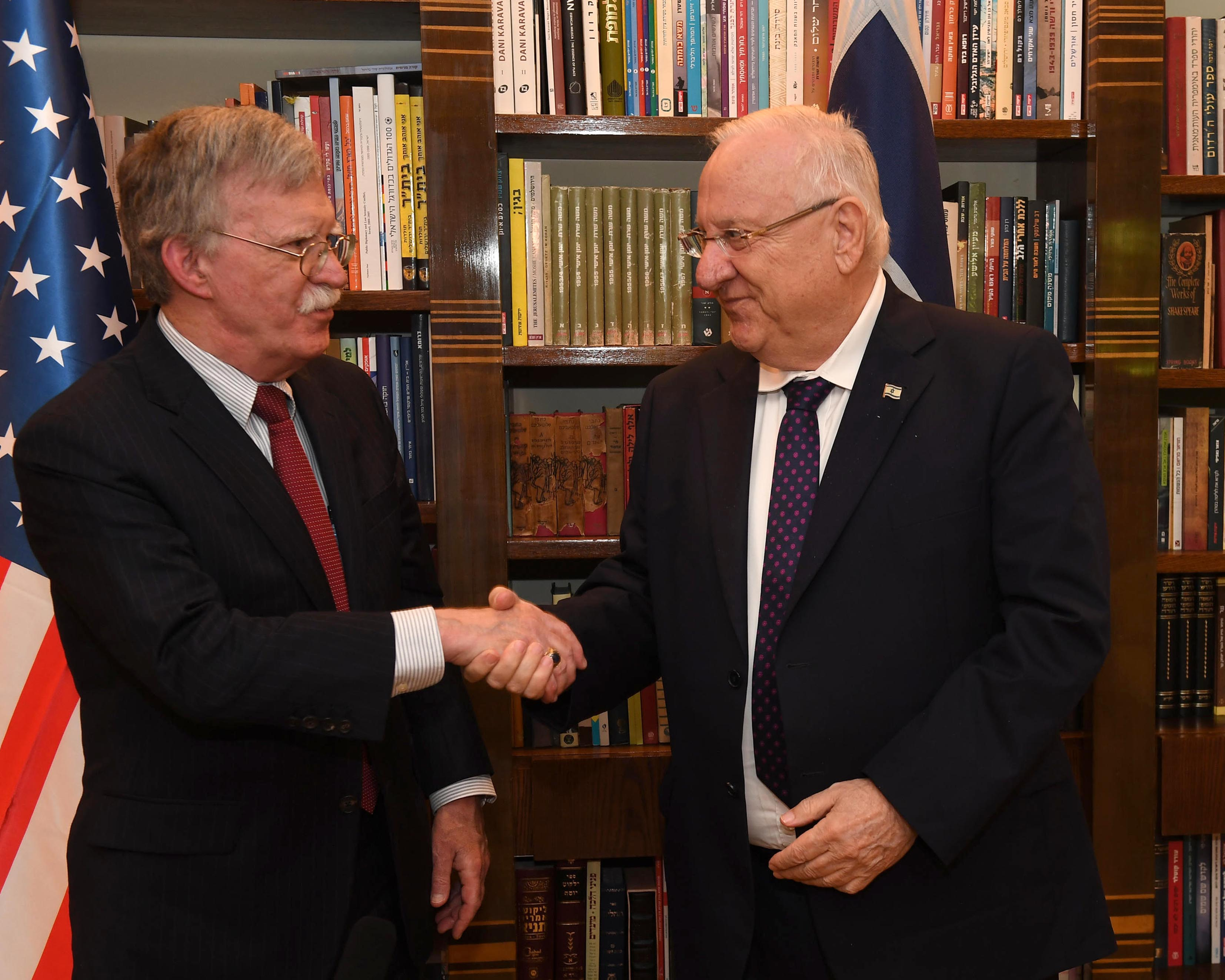 ראובן ריבליו נשיא מדינת ישראל נפגש עם היועץ לביטחון לאומי של ארצות הברית ג'ון בולטון המבקר בישראל